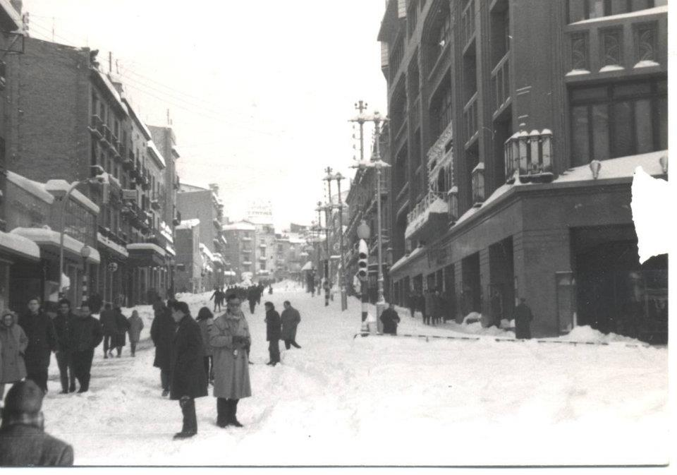 Fotografies de la nevada del desembre de 1962, realitzades per Rossend Capellà.